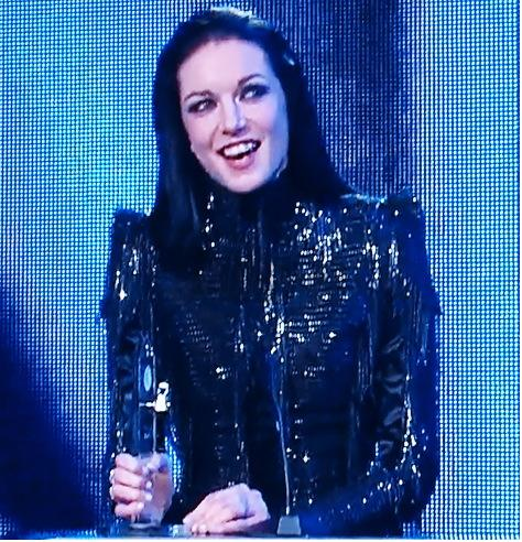 Zuzana Smatanová pri preberaní ceny za najlepšiu speváčku na Slávikovi 2010.